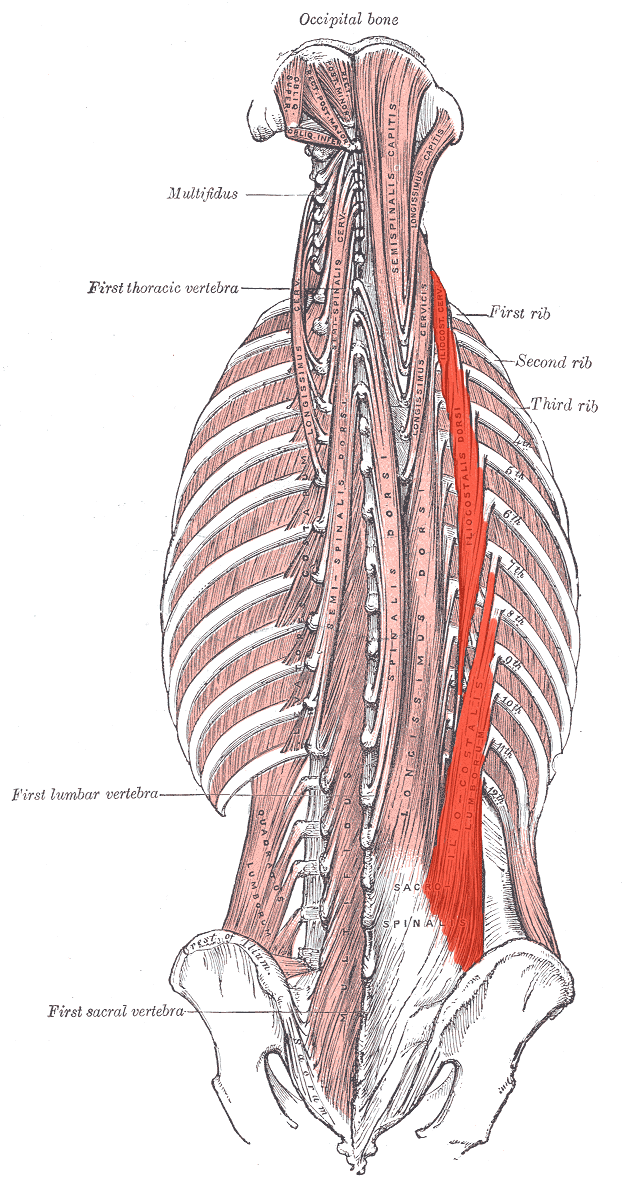 Iliostalis muscle